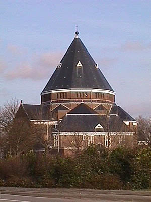 Eigen werk